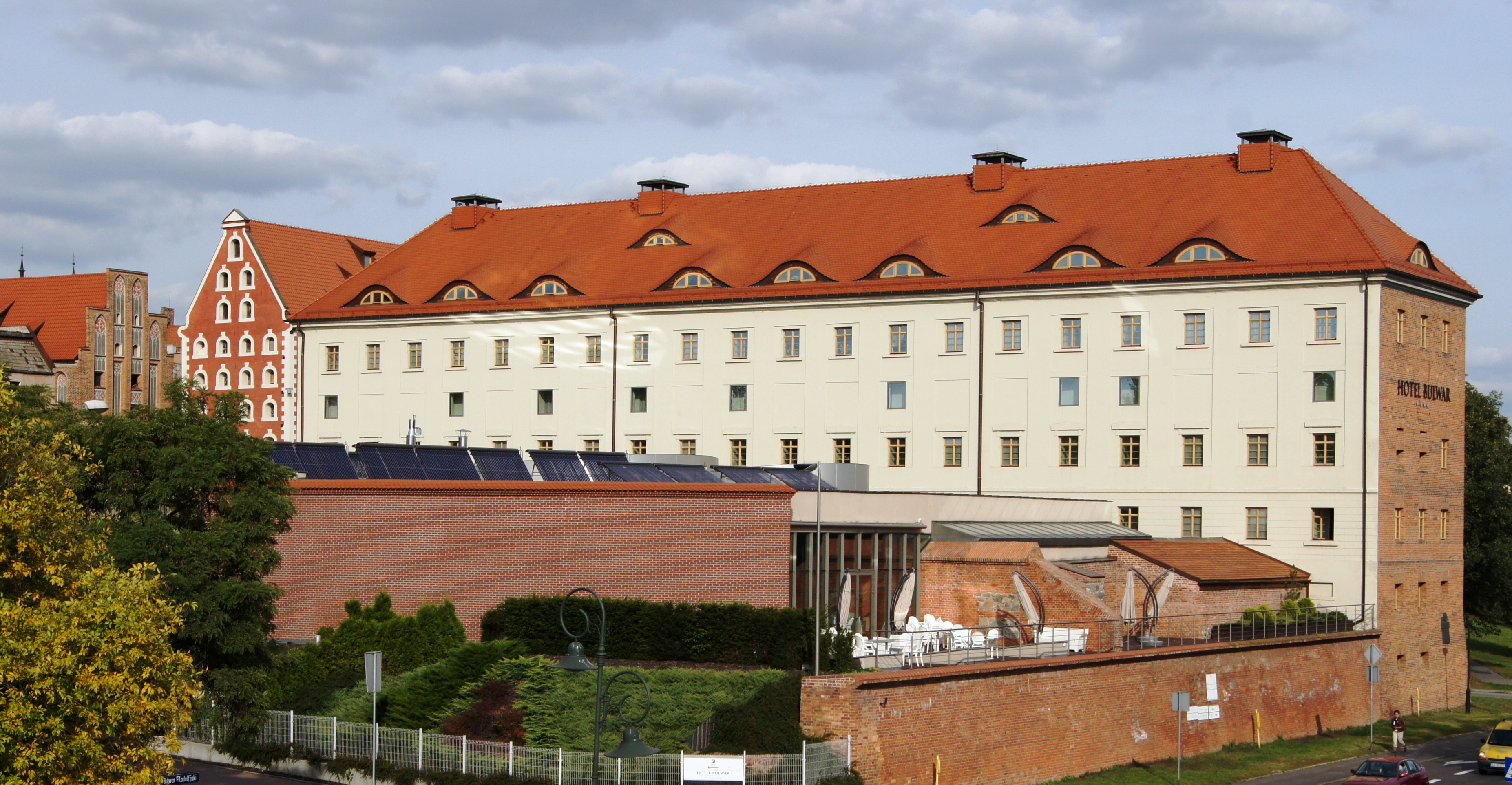 Koszary Racławickie dawnej Twierdzy Toruń, obecnie hotel Bulwar